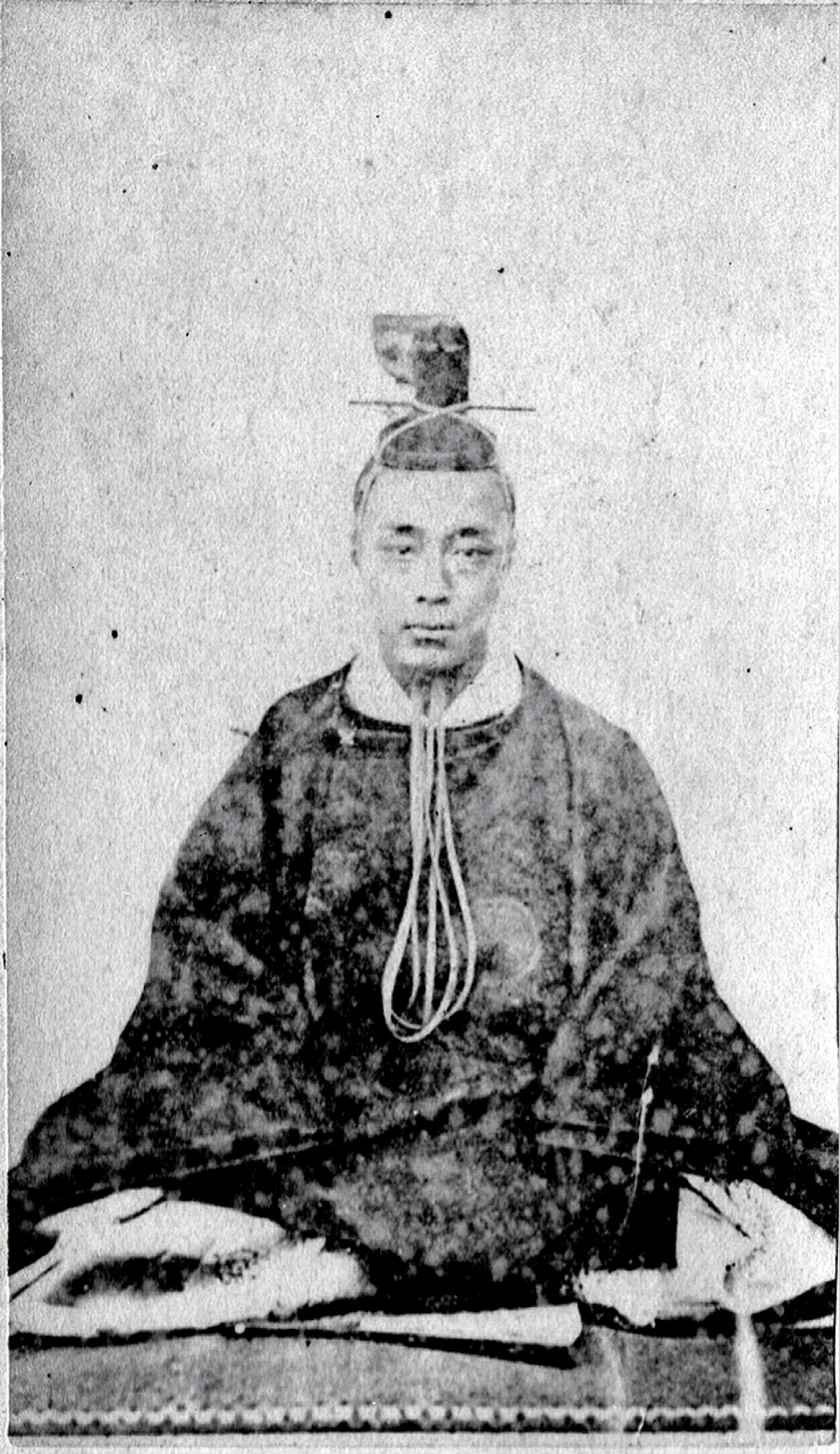 徳川慶喜の肖像写真